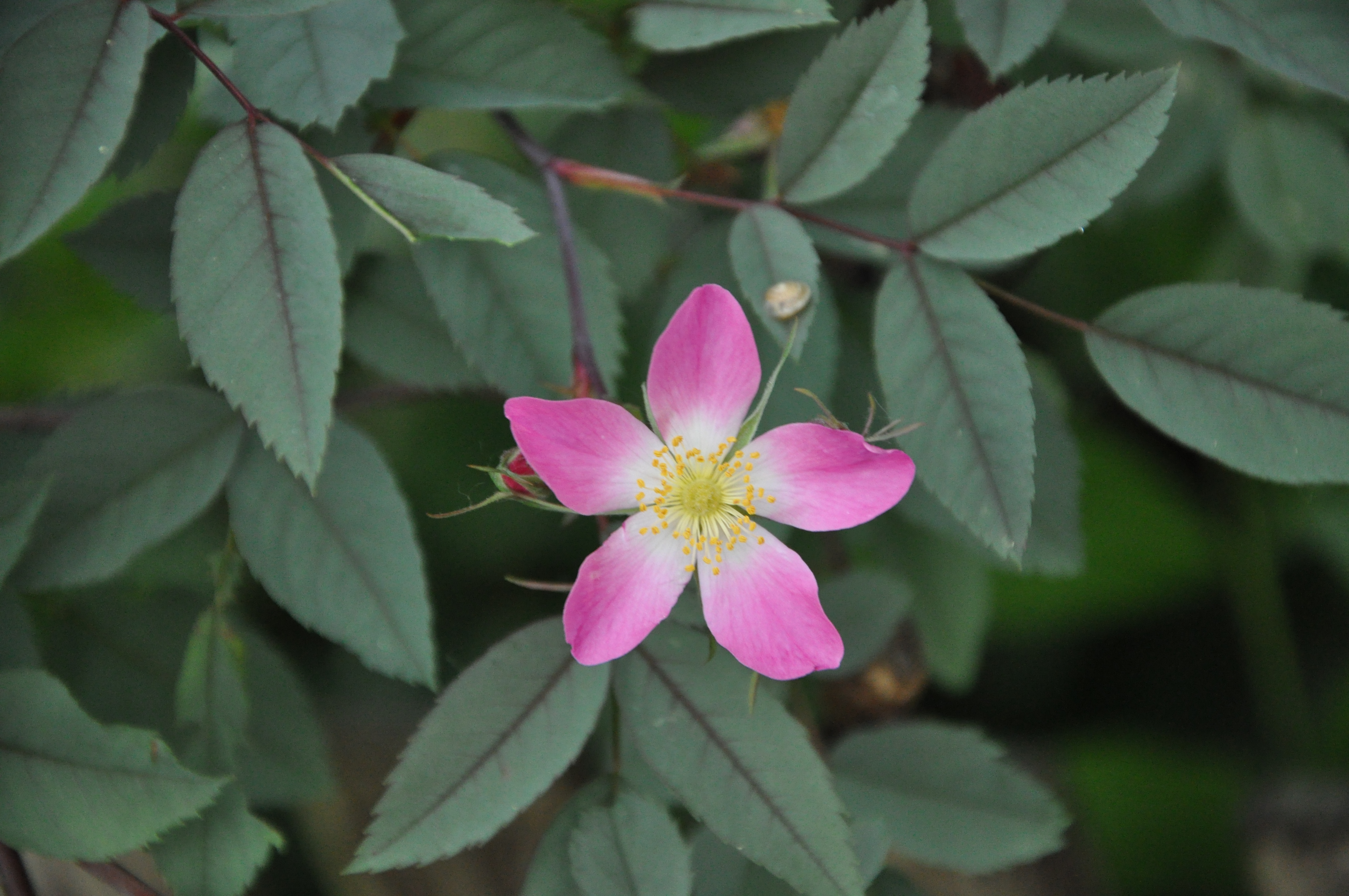 Rosa glauca